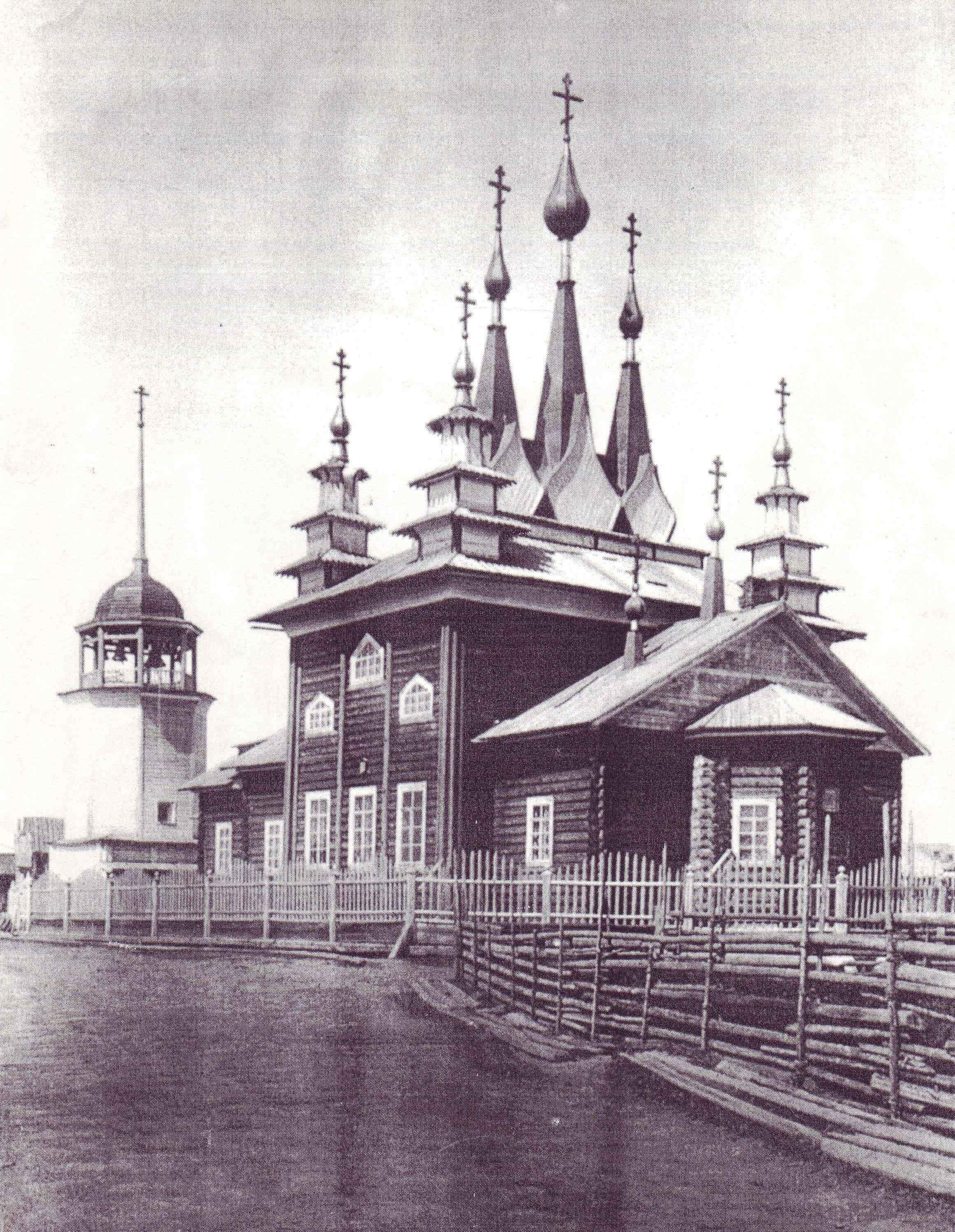 Рождественская церковь в Шардонеми. Частично сохранилась